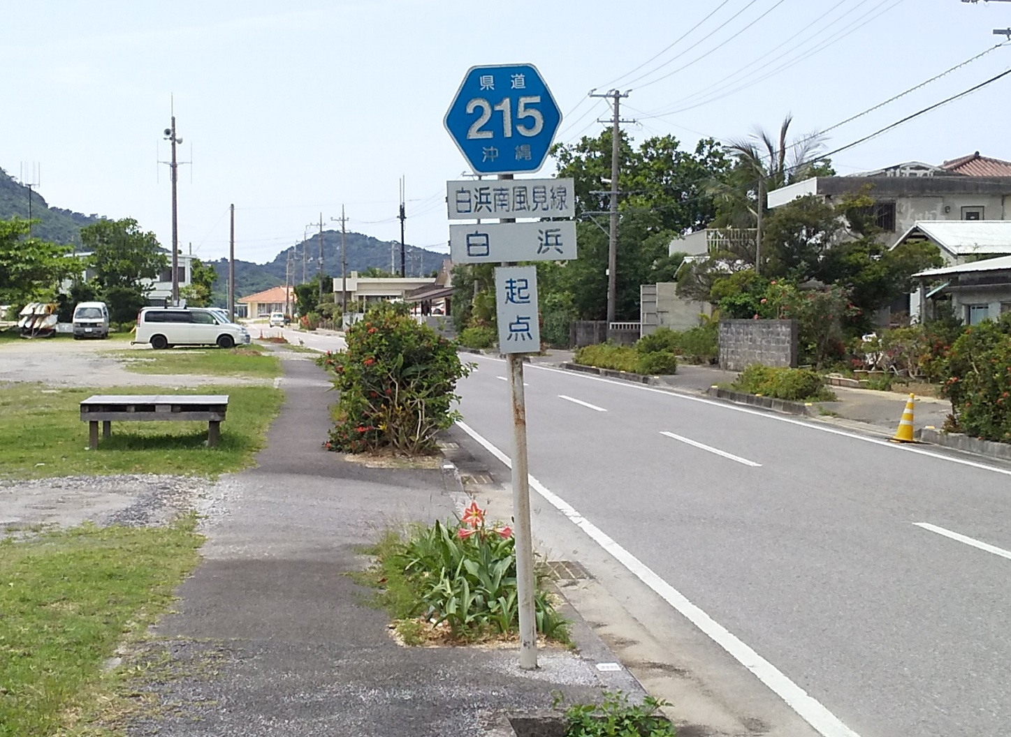 西表島にて撮影